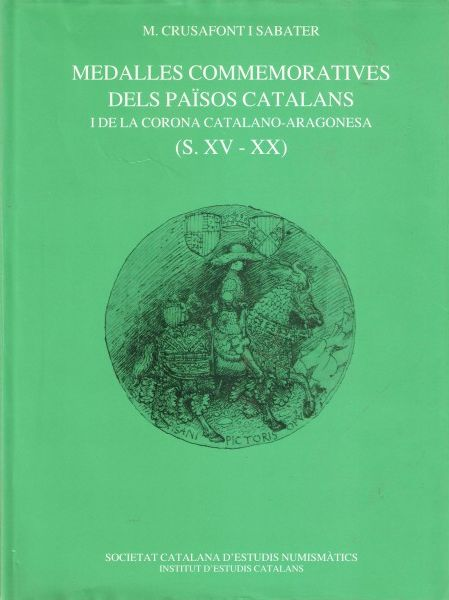 Catalan Medals from XV Century to XX. Miquel Crusafont, IEC, 2006